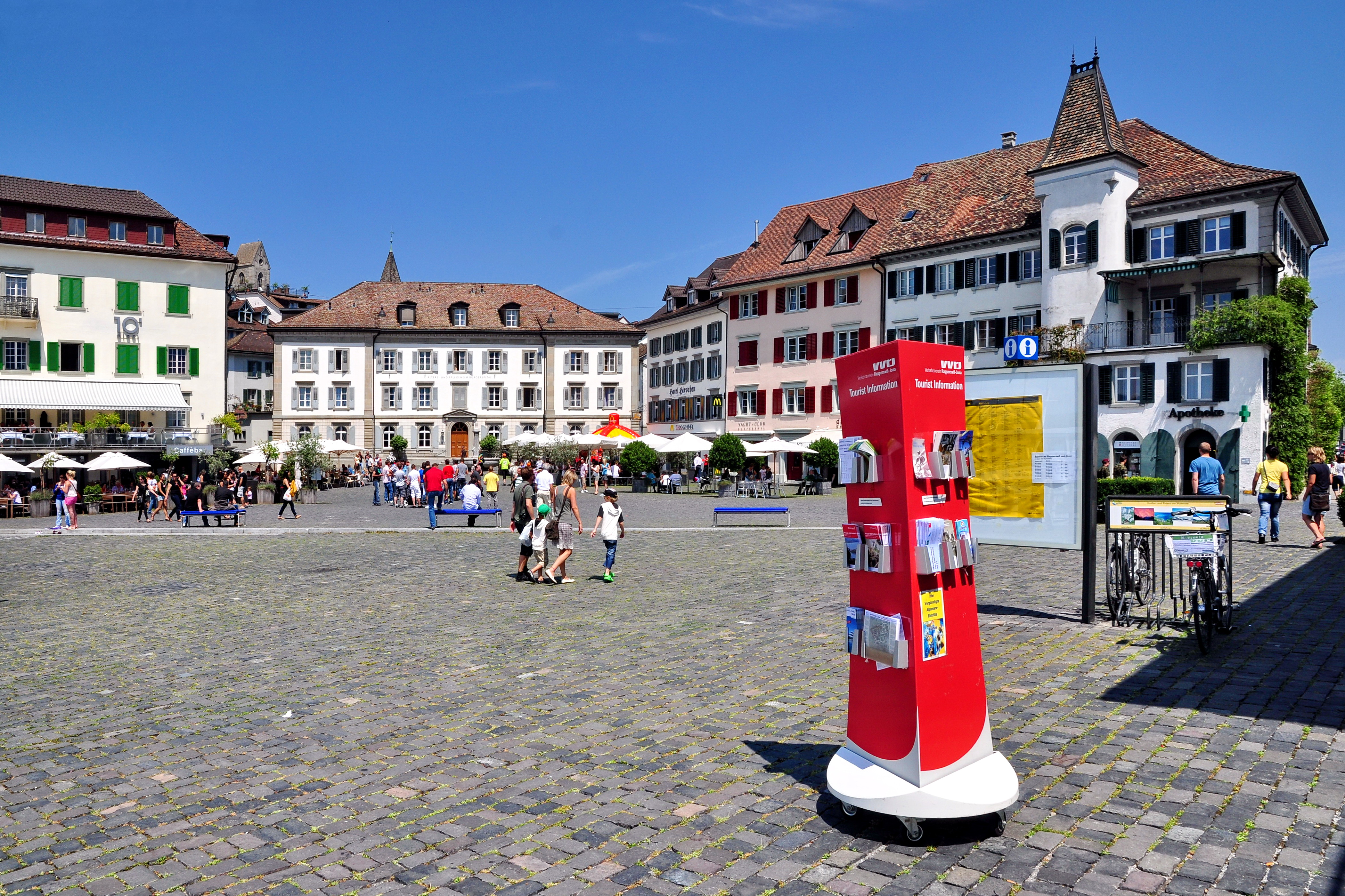 Fischmarktplatz in Rapperswil (Switzerland)